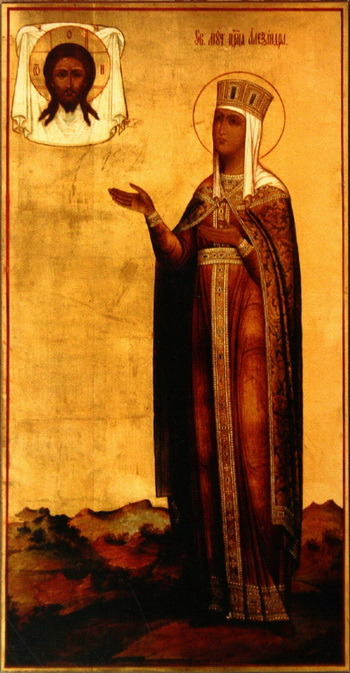 Святая Александра